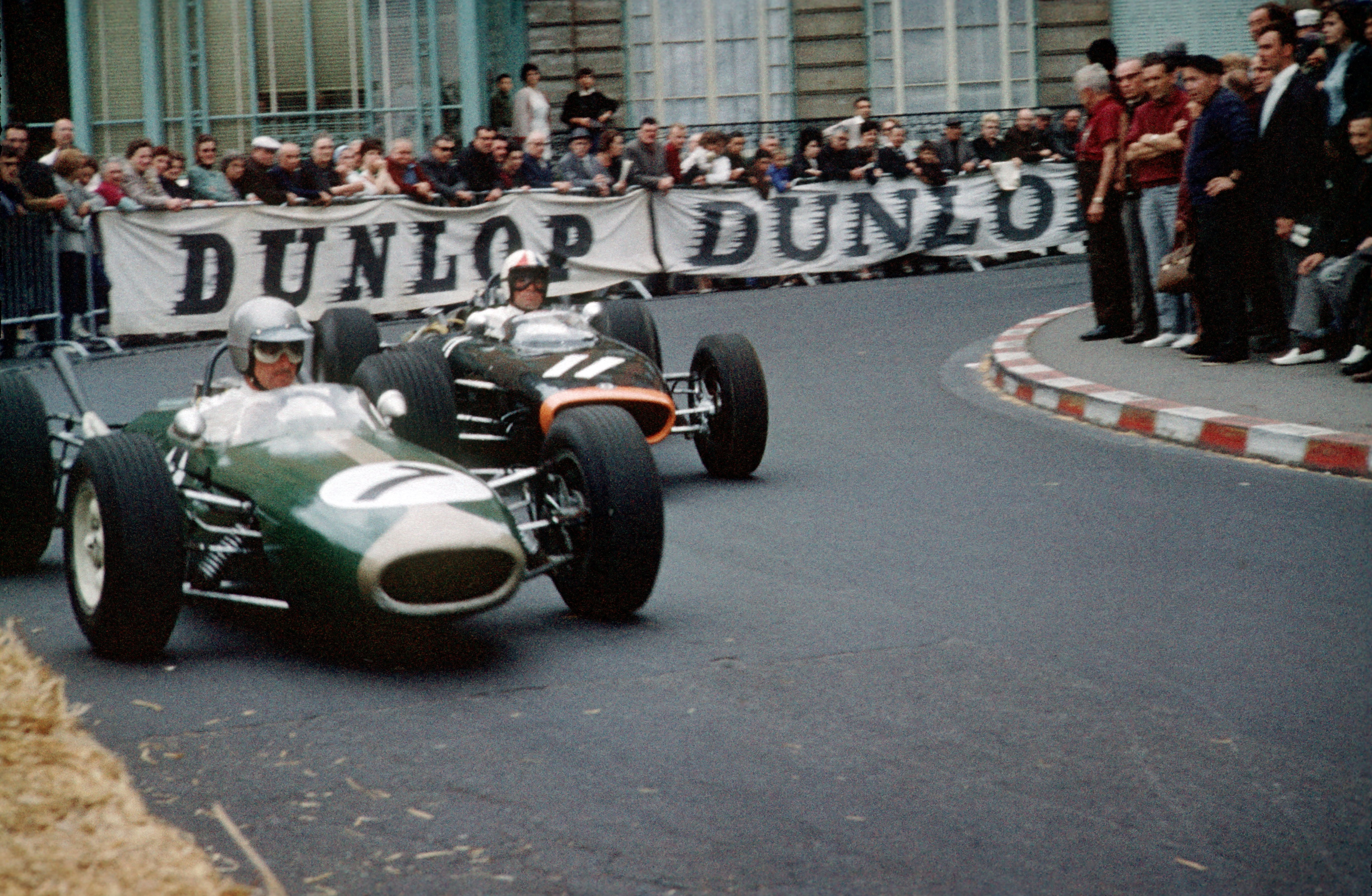 Tournage du film Grand Prix, en 1966 à Royat (près du circuit de Charade).